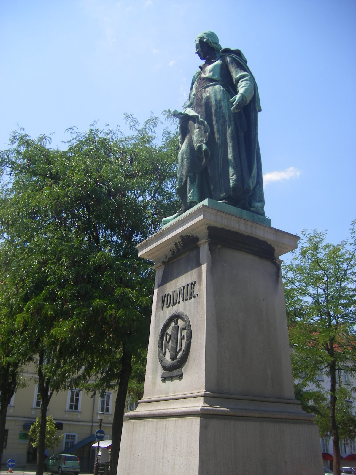 Valentin Vodnik monument, Ljubljana